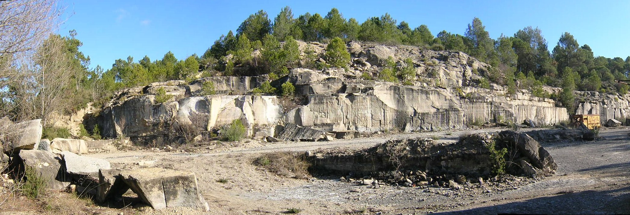 Pedrera de Coll Girant (Monistrol de Calders, Moianès)